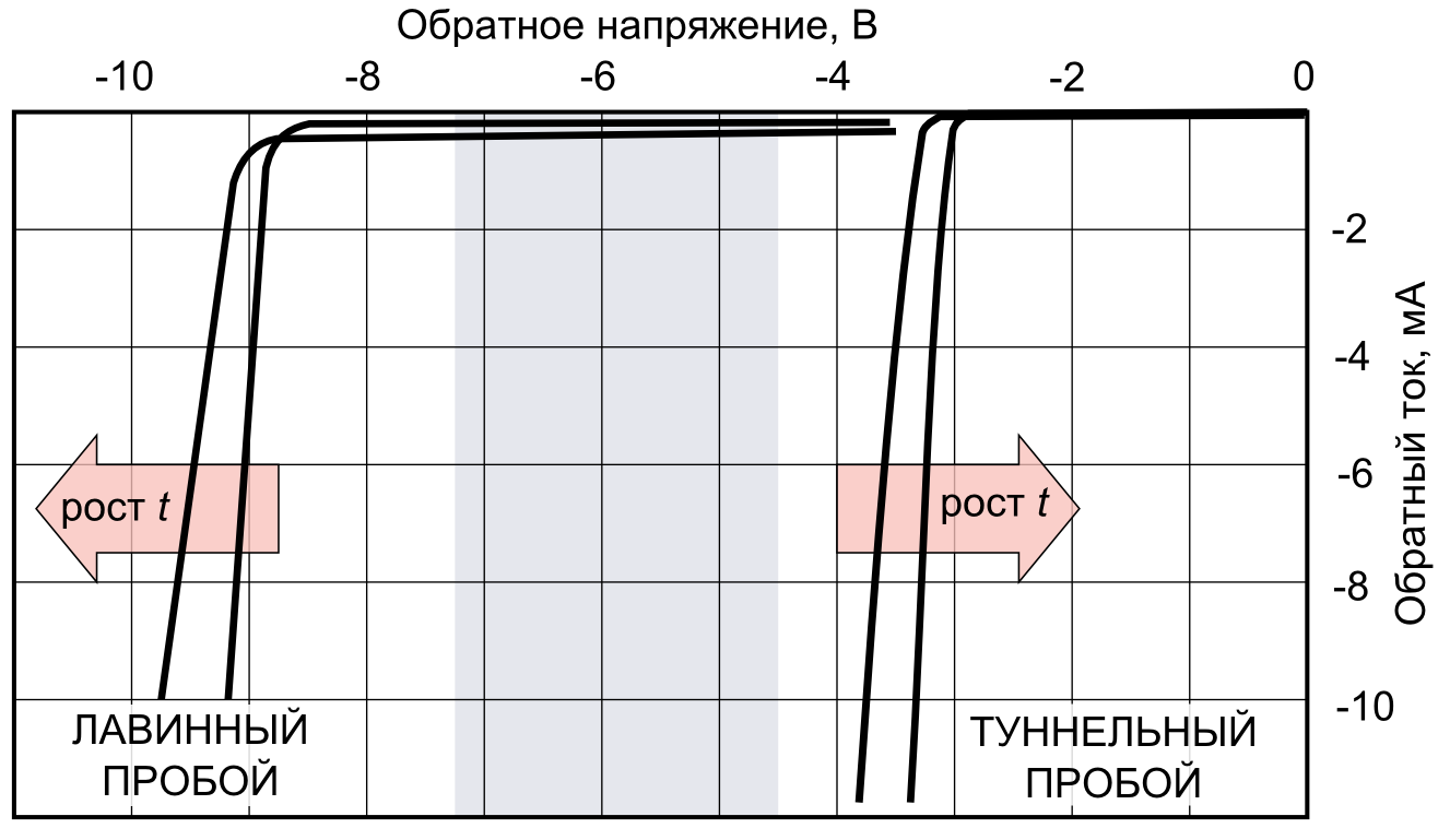 Туннельный и лавинный пробой в стабилитроне